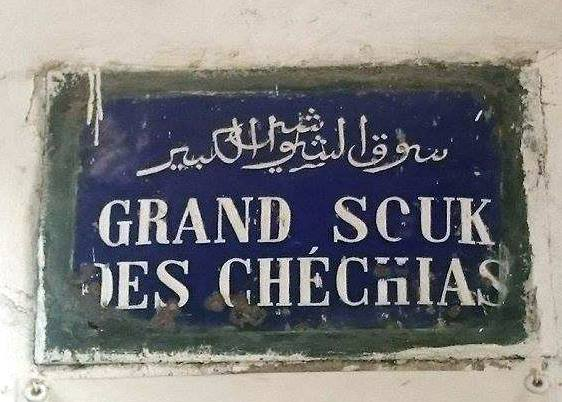 plaque métallique a l'entrée de Grand Souk Des CHECHIAS